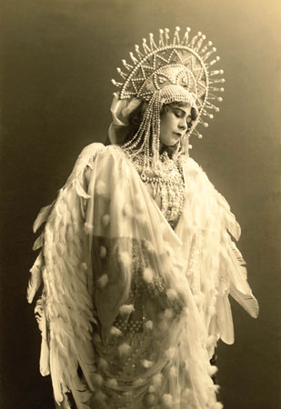 . Елена Степанова в партии Царевны-Лебеди. «Сказка о царе Салтане». 1913 г. Музей Большого театра